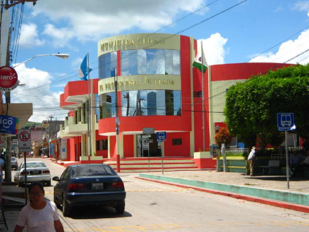 es la municipalidad el progreso jutiapa